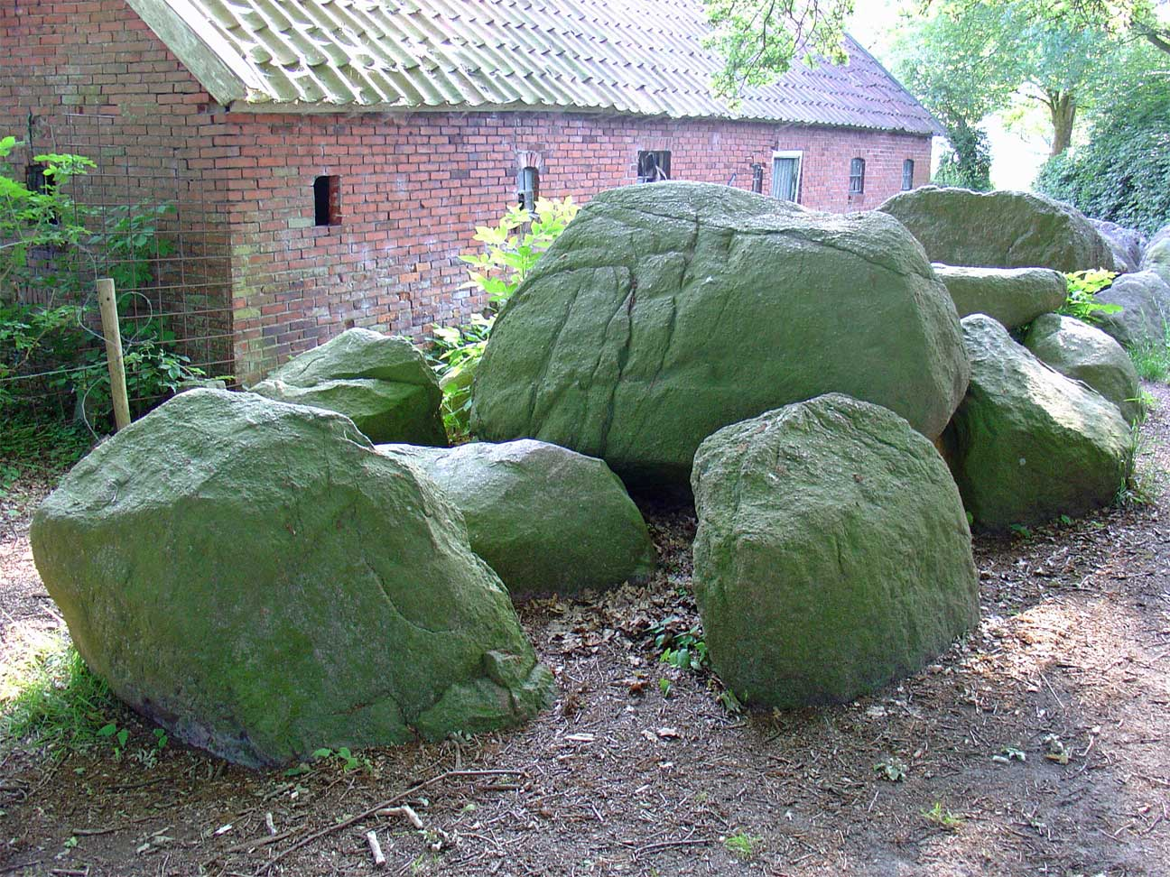 Hunebed D4 te Midlaren